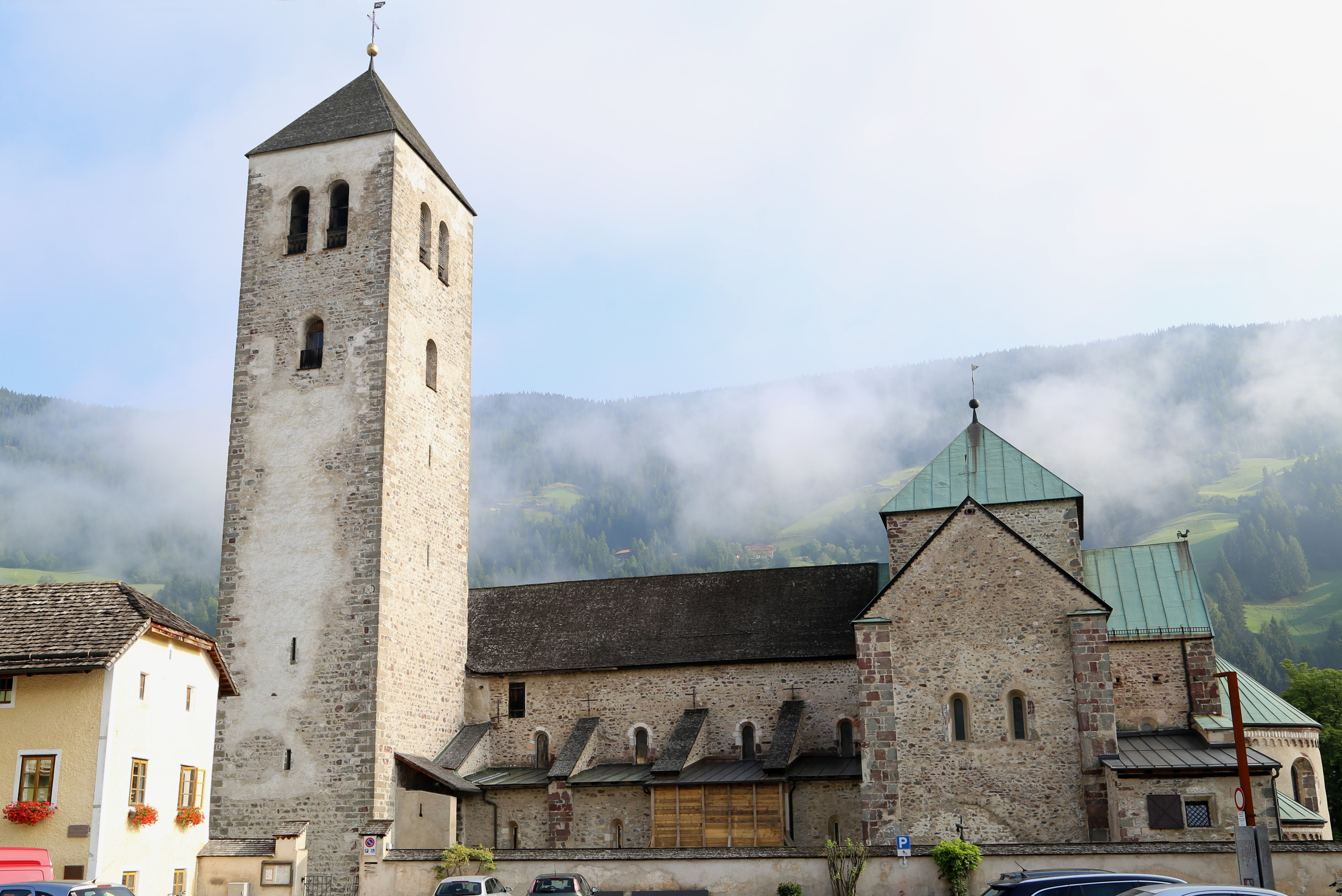 Stiftskirche St. Candidus und St. Korbinian in Innichen Dreischiffige romanische Basilika mit Querschiff, Vierungskuppel und drei Apsiden. Nach dem Brand im Jahre 1200 neu aufgebaut, 1284 geweiht. Krypta mit Säulenreihen 1967 1969 rekonstruiert. Fassa-denturm 1320 1326 aufgeführt, Vorhalle 1469 hinzugebaut. Nothelferkapelle 1524 geweiht. Südportal mit Steinrelief und Fresken von Michael Fächer. Wandgemälde in der Vierungskuppel (Schöpfungsgeschichte) um 1280.